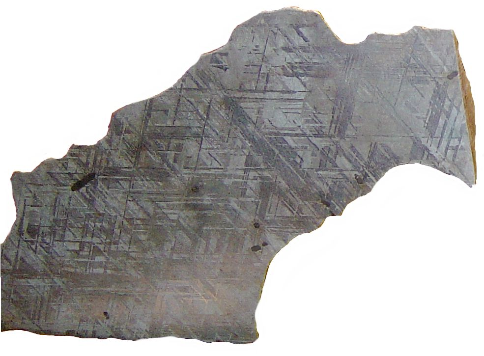 Coupe d'une météorite type Iron-IVA, trouvée à Hardap (Namibie) en 1836.